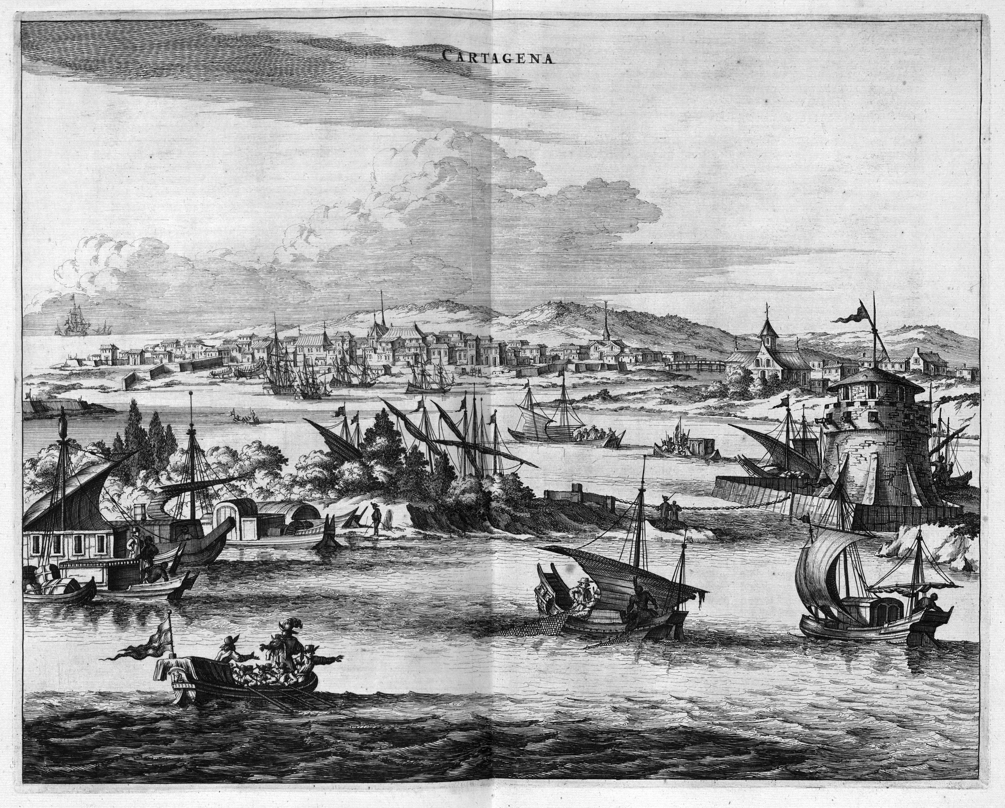 Cartagena de Indias, Colombia (ca. 1600)